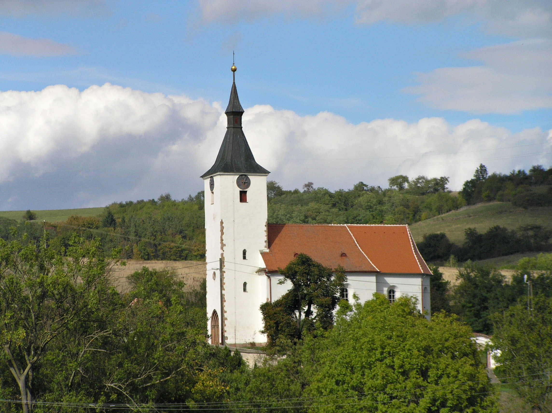 Kostel sv. Martina v Dolních Loučkách.